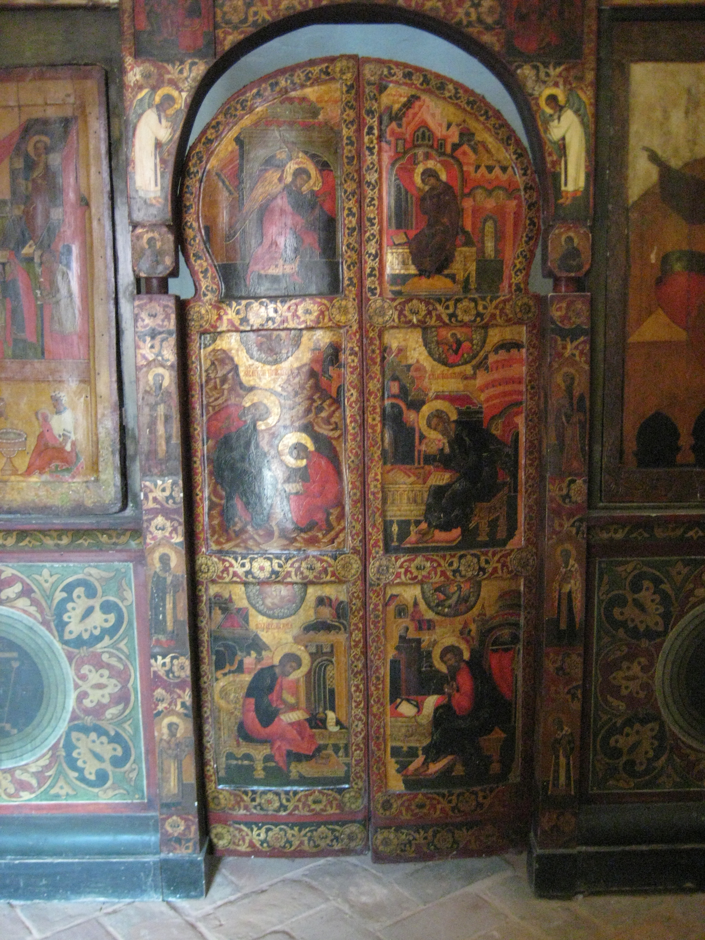 Собор Василия Блаженного